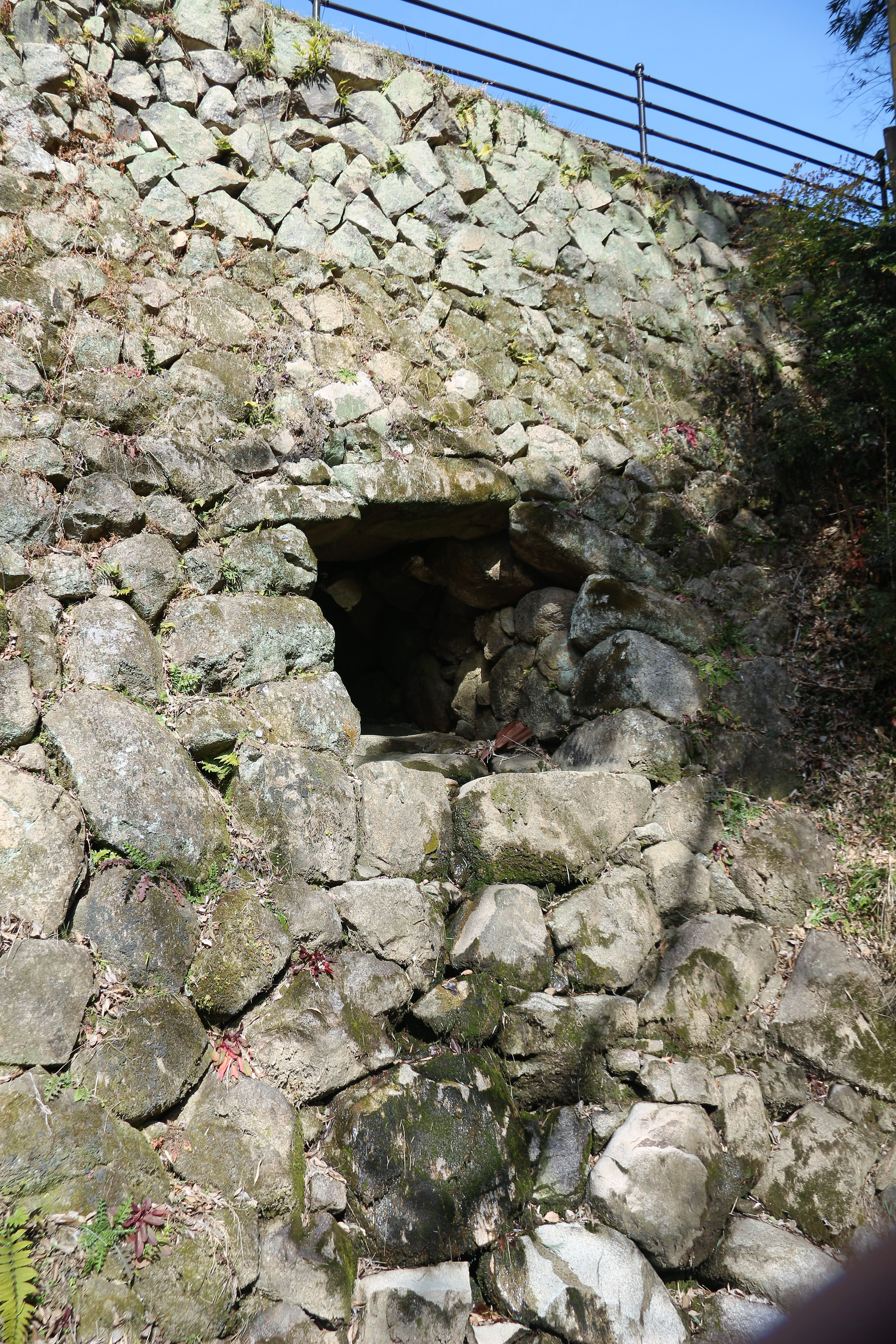 広島県福山市新市町常の金名の郷頭。下流側より見る。